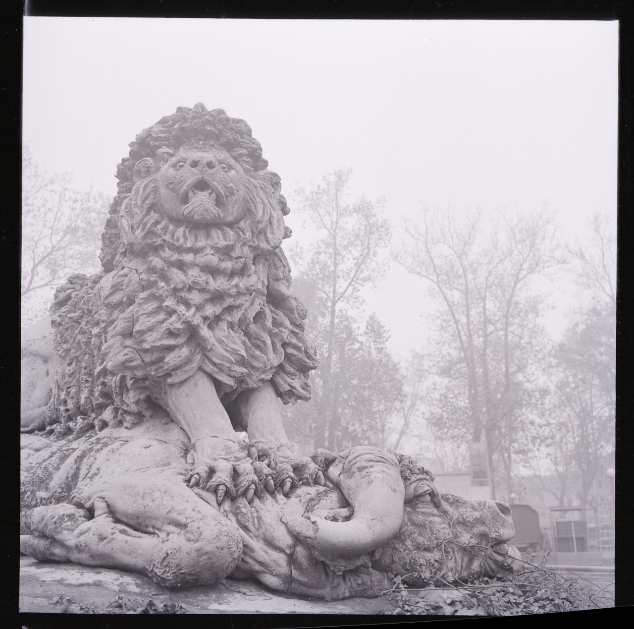 Bologna. Parco della Montagnola. Diego Sarti, Fontana delle Sirene, 1888, cemento, particolare con il leone che abbatte il bufalo e gruppi di sirene. Servizio fotografico : Bologna, 1970 / Paolo Monti. - Buste: 5, Fototipi: 5 : Negativo b/n, gelatina bromuro d'argento/ pellicola ; 6x6. - ((Serie costituita da 4 buste di negativi identificati con i nn.: 14094, 14095, 14096, 14097, 14098, e tenute insieme da una graffetta. . - Sulla busta identificata con il n. 14094 iscrizione didascalica manoscritta a penna.